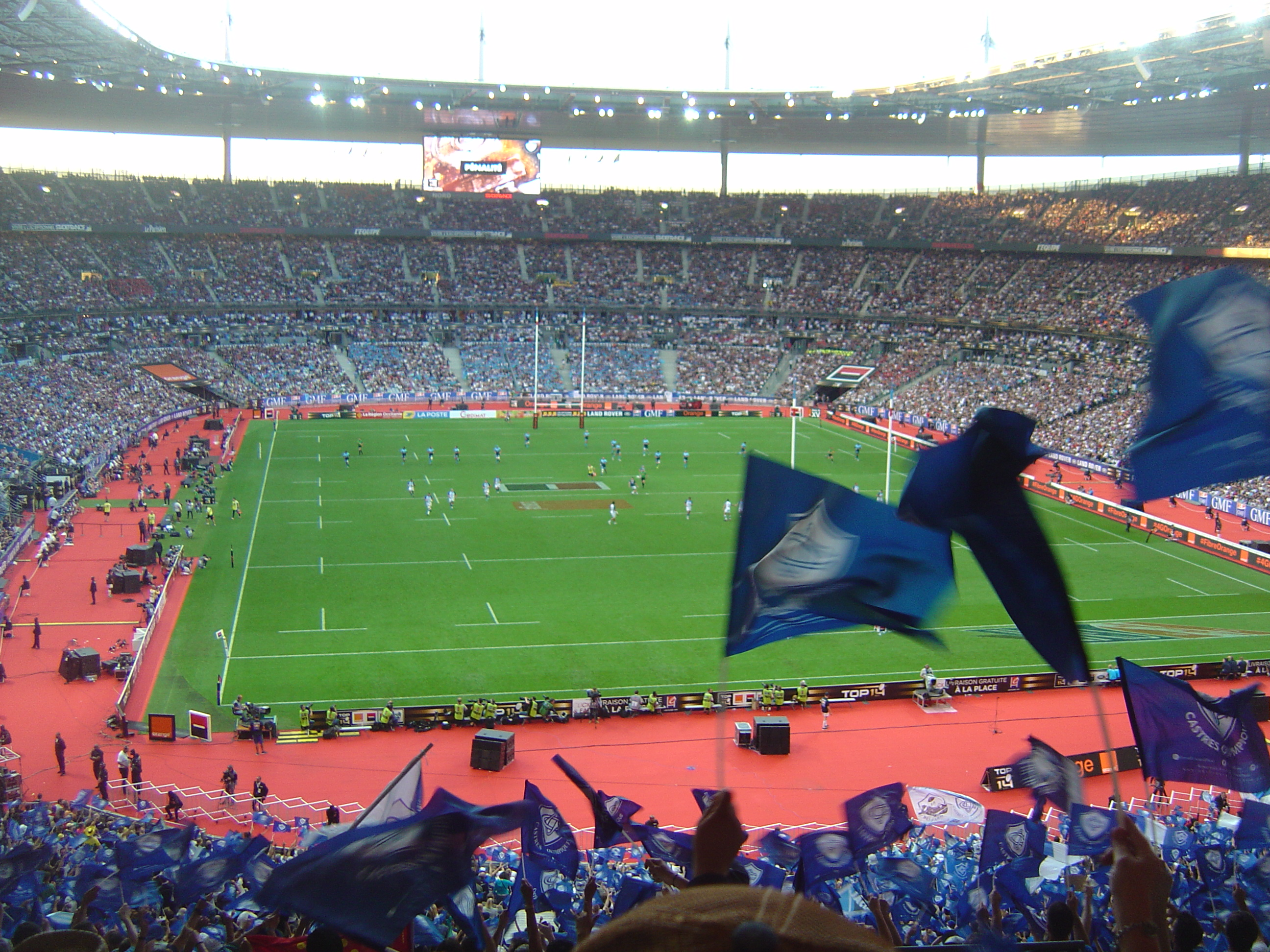 Finale du Top 14 entre le Montpellier Herault Rugby et le Castres Olympique le 2 juin 2018. Au milieu des supporters de Castres. Une pénalité au début du match.